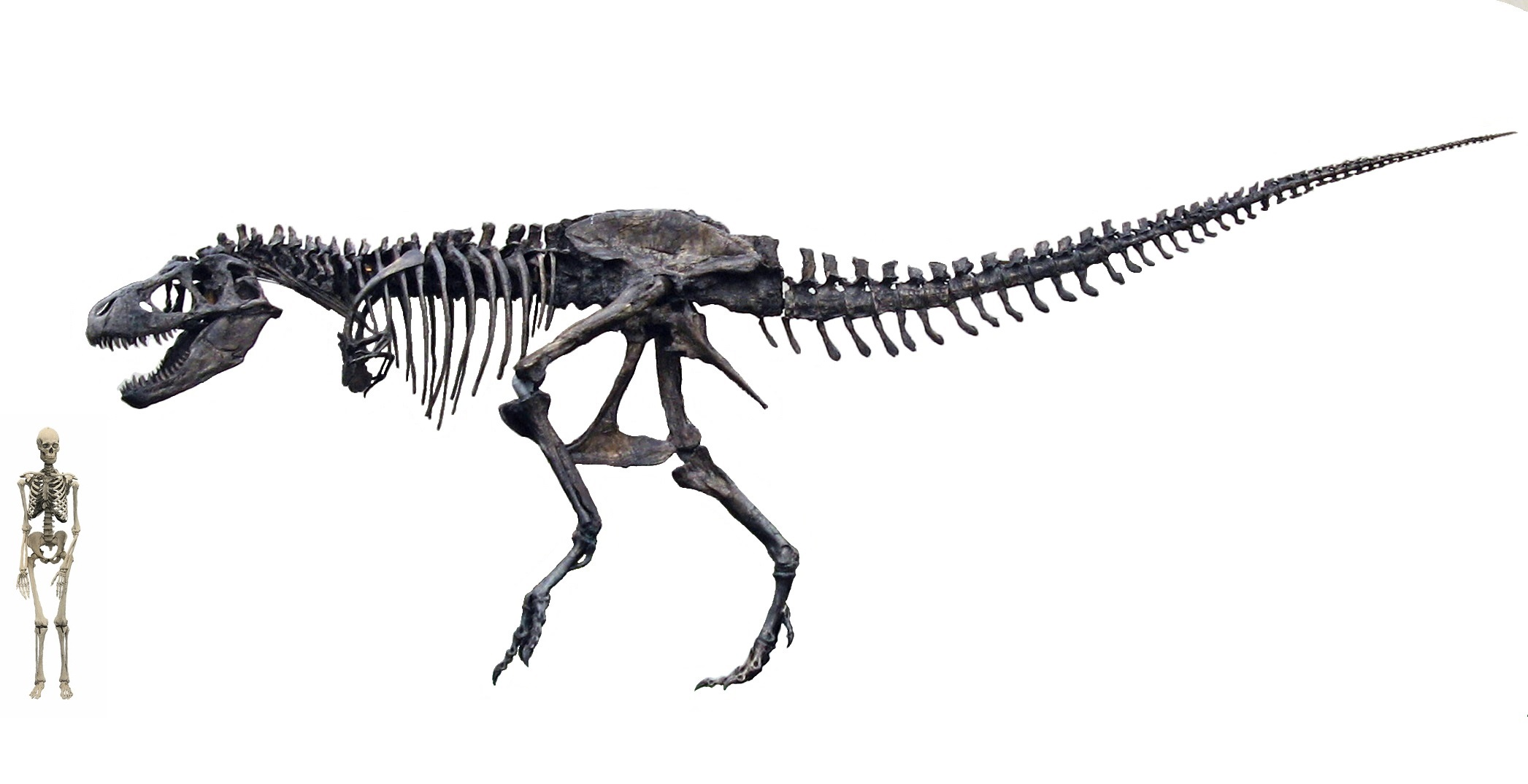 Human and T. rex skeletons